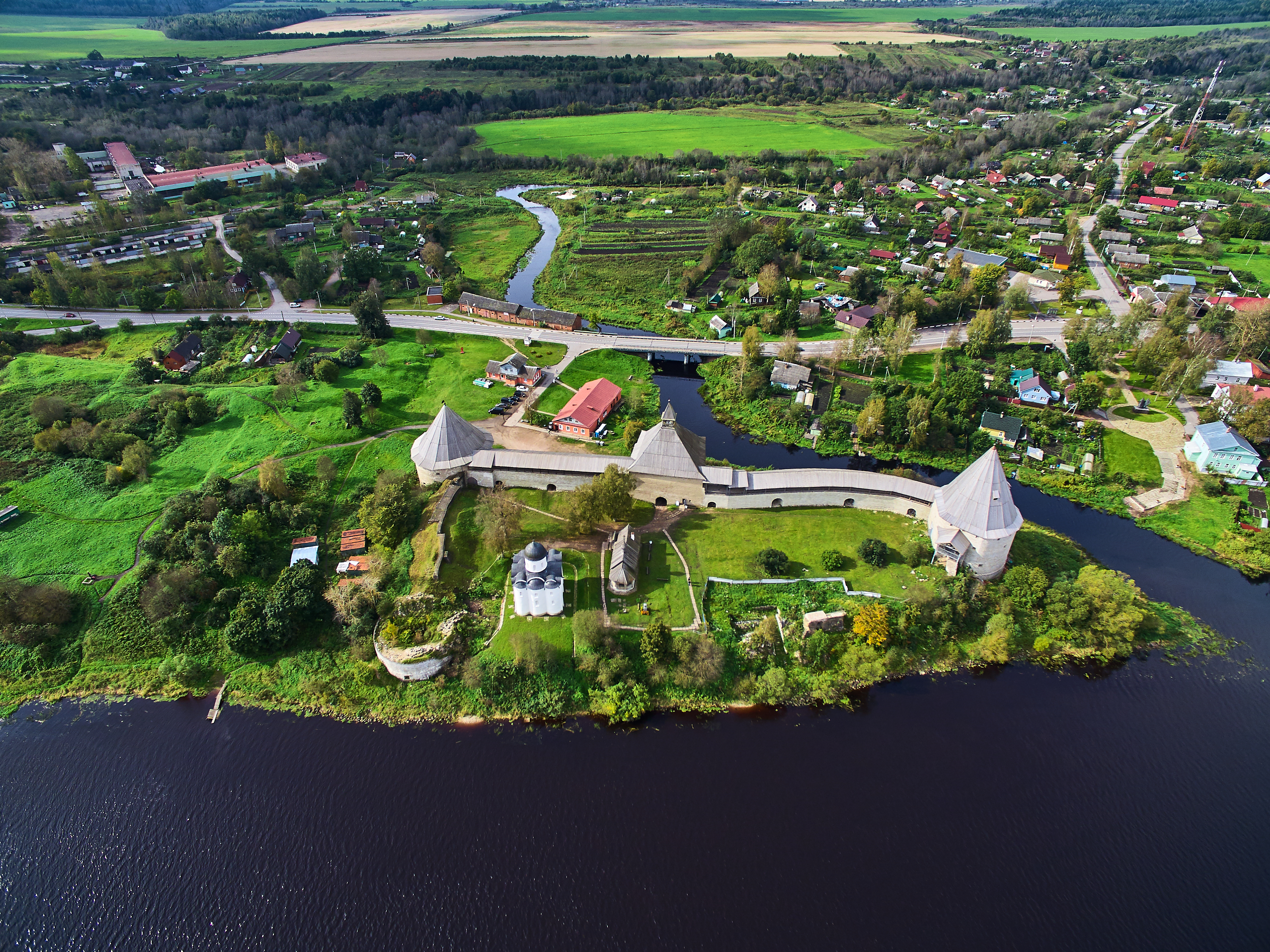 Крепость "Старая Ладога": Старая Ладога, Старая Ладога, Волховский район, Ленинградская область